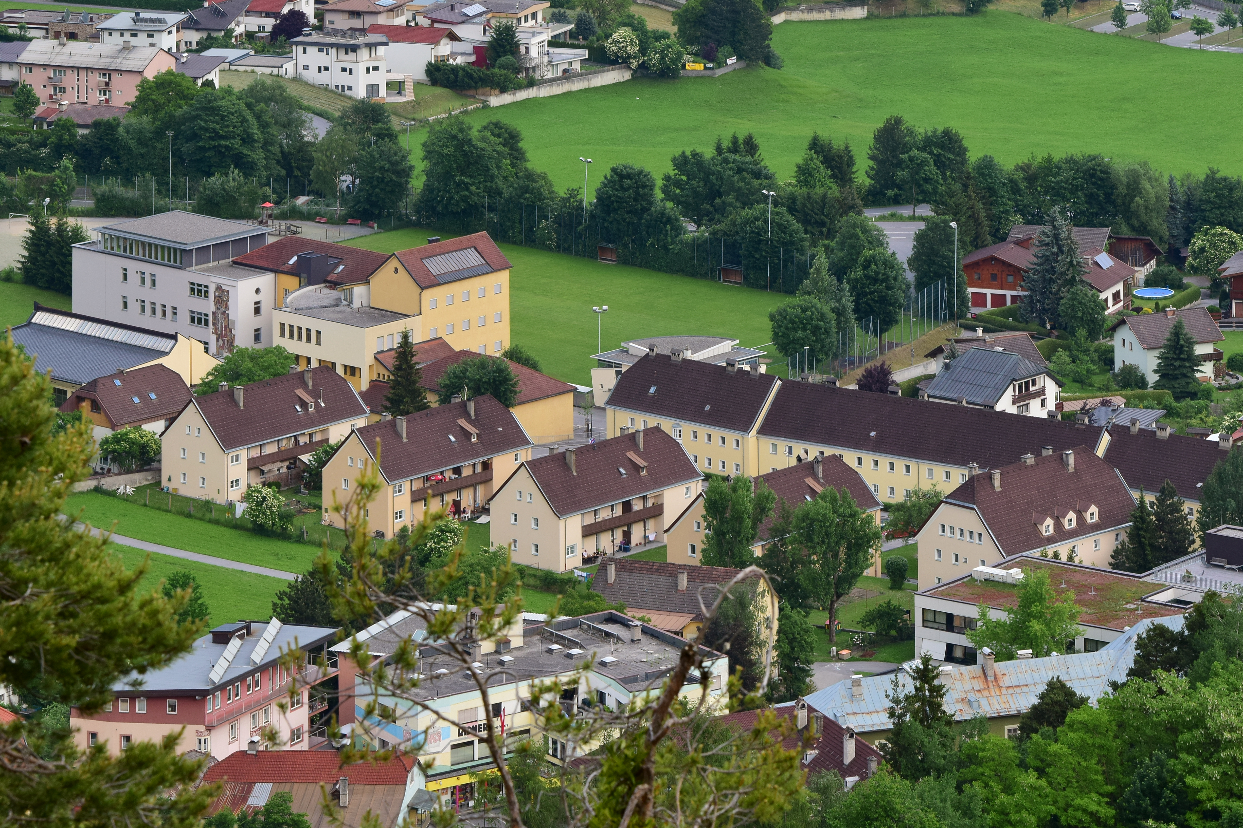 Volksschule und Neue Mittelschule Oberstadt, sowie sozialer Wohnbau aus 1940, Südtirolersiedlung in der Franz-Xaver-Renn-Straße